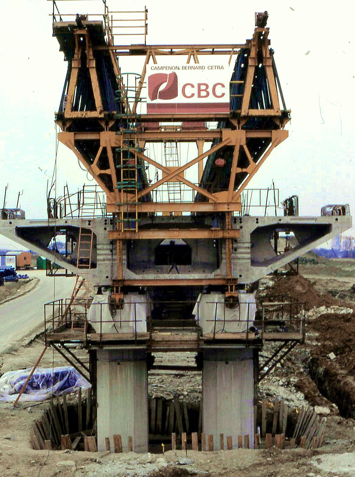 RER A - Viaduc de Torcy - Construction en voussoirs préfabriqués - Etançon de la poutre de lancement sur pile